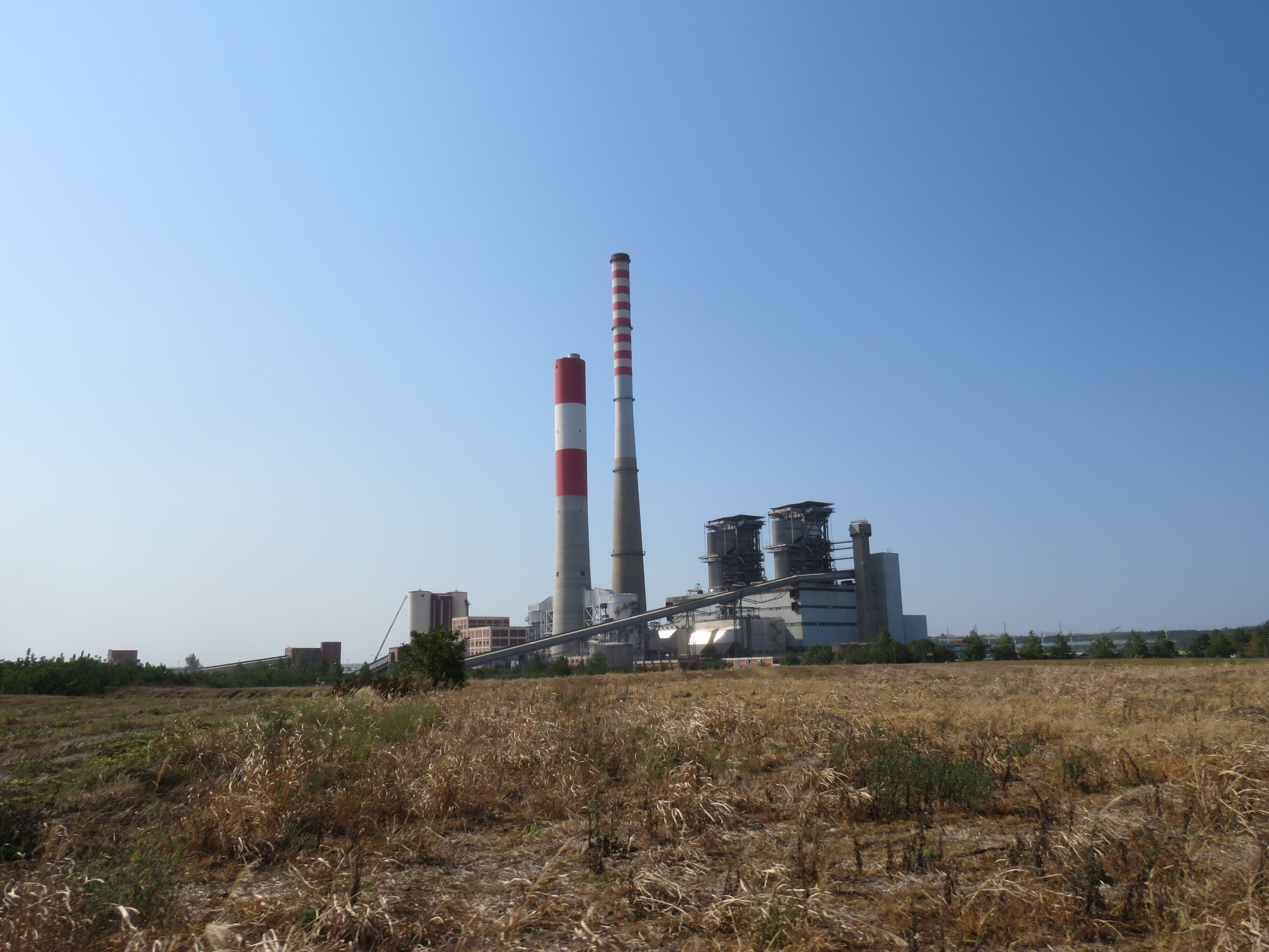 Termoelektrana Kostolac B